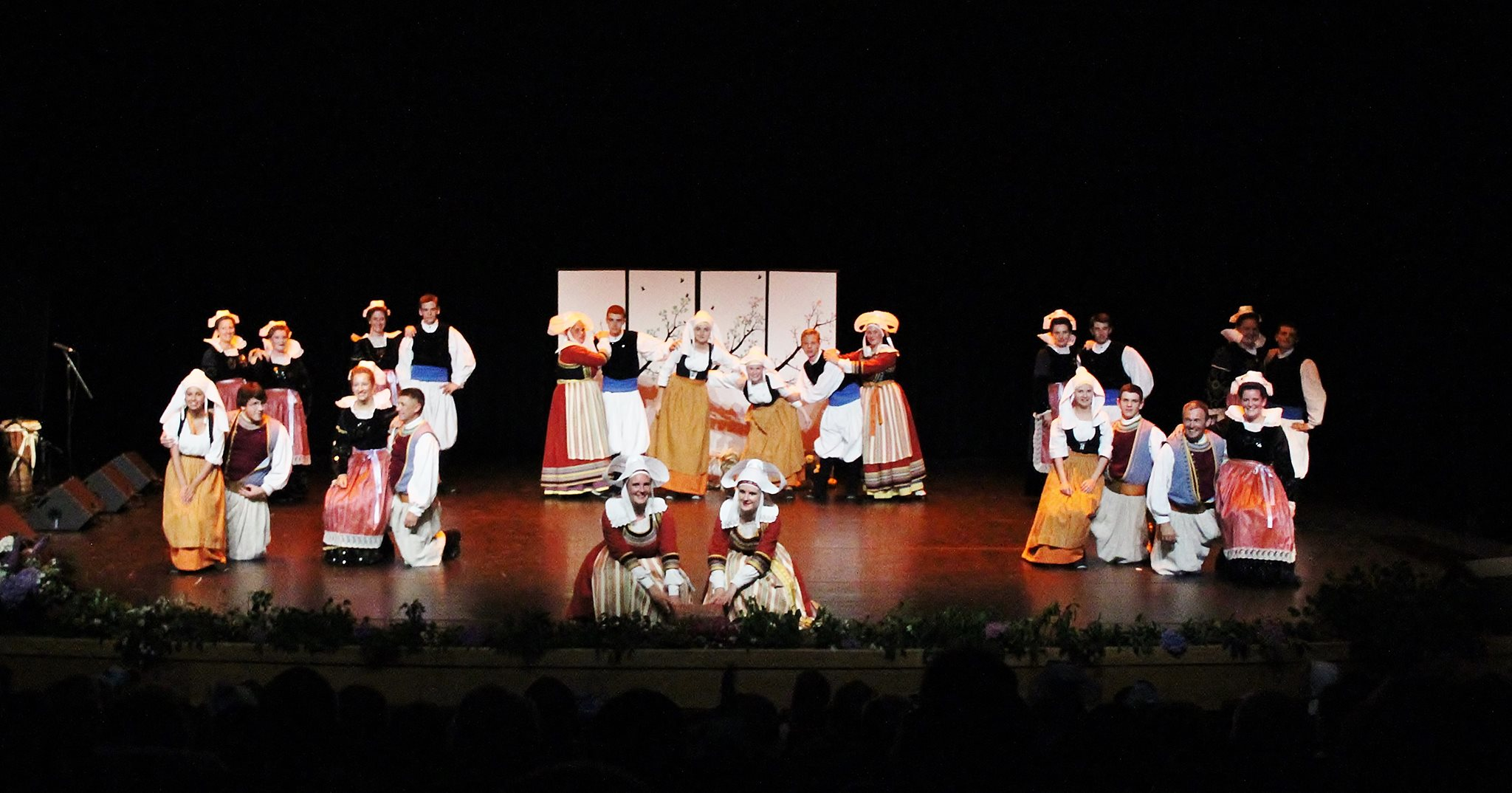 Spectacle Kevrin Juin 2015